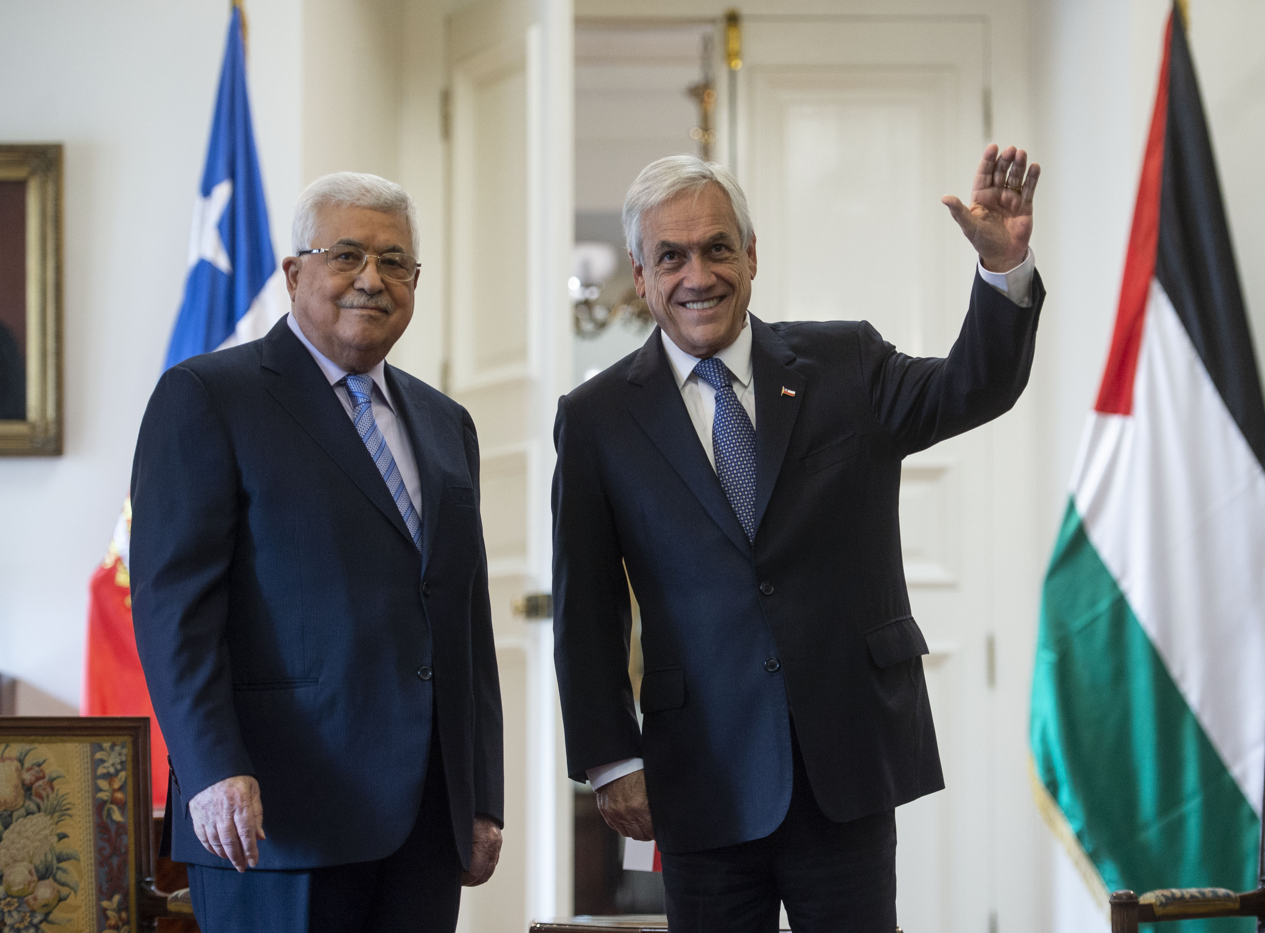 Presidente Piñera recibe en visita oficial a Presidente de Palestina, Mahmud Abás